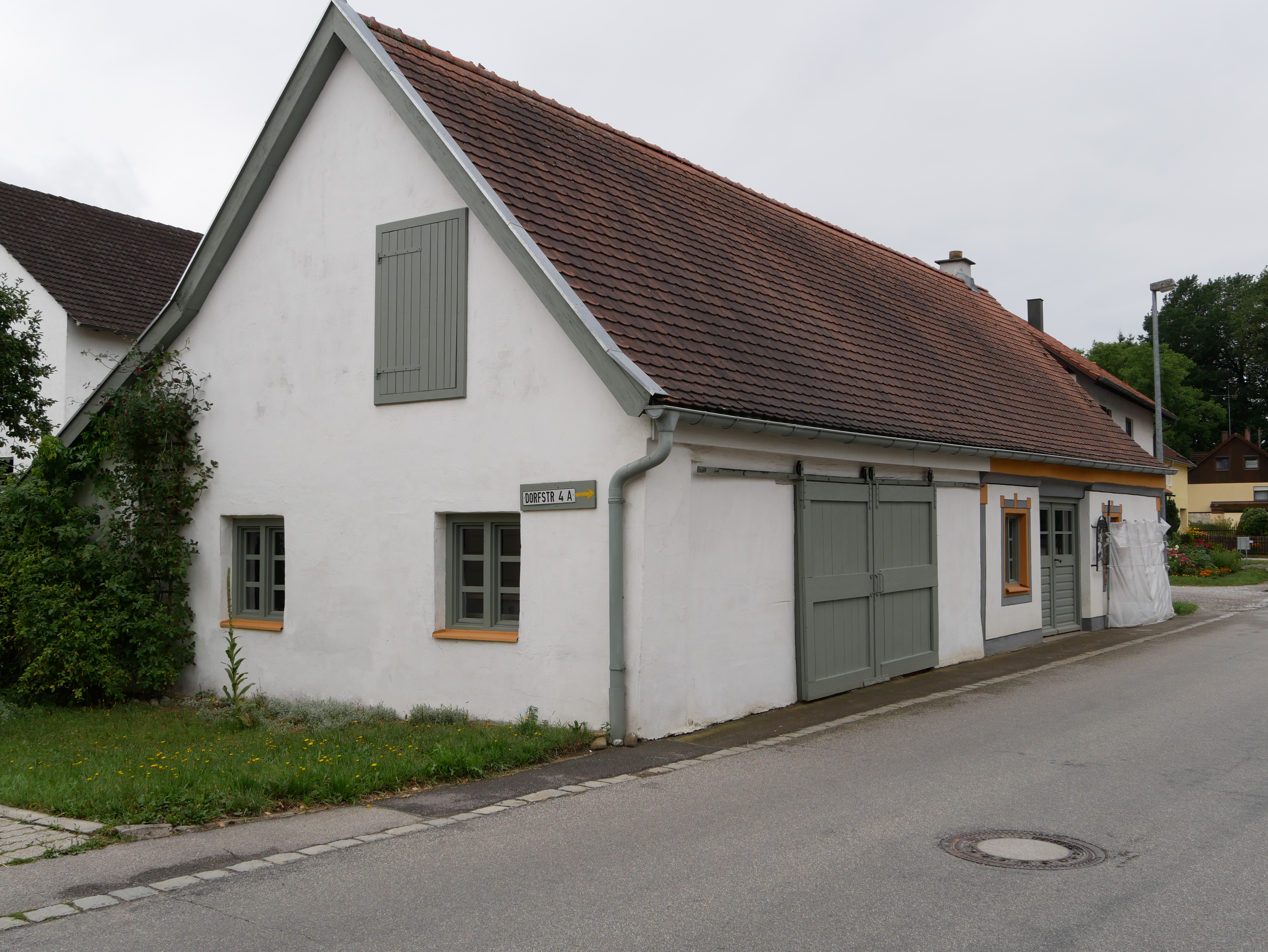 Fürstenfeldbruck, Ortsteil Aich, Dorfstraße Nähe Gasthaus: Ehemalige Schmiede. Ansicht von ONO